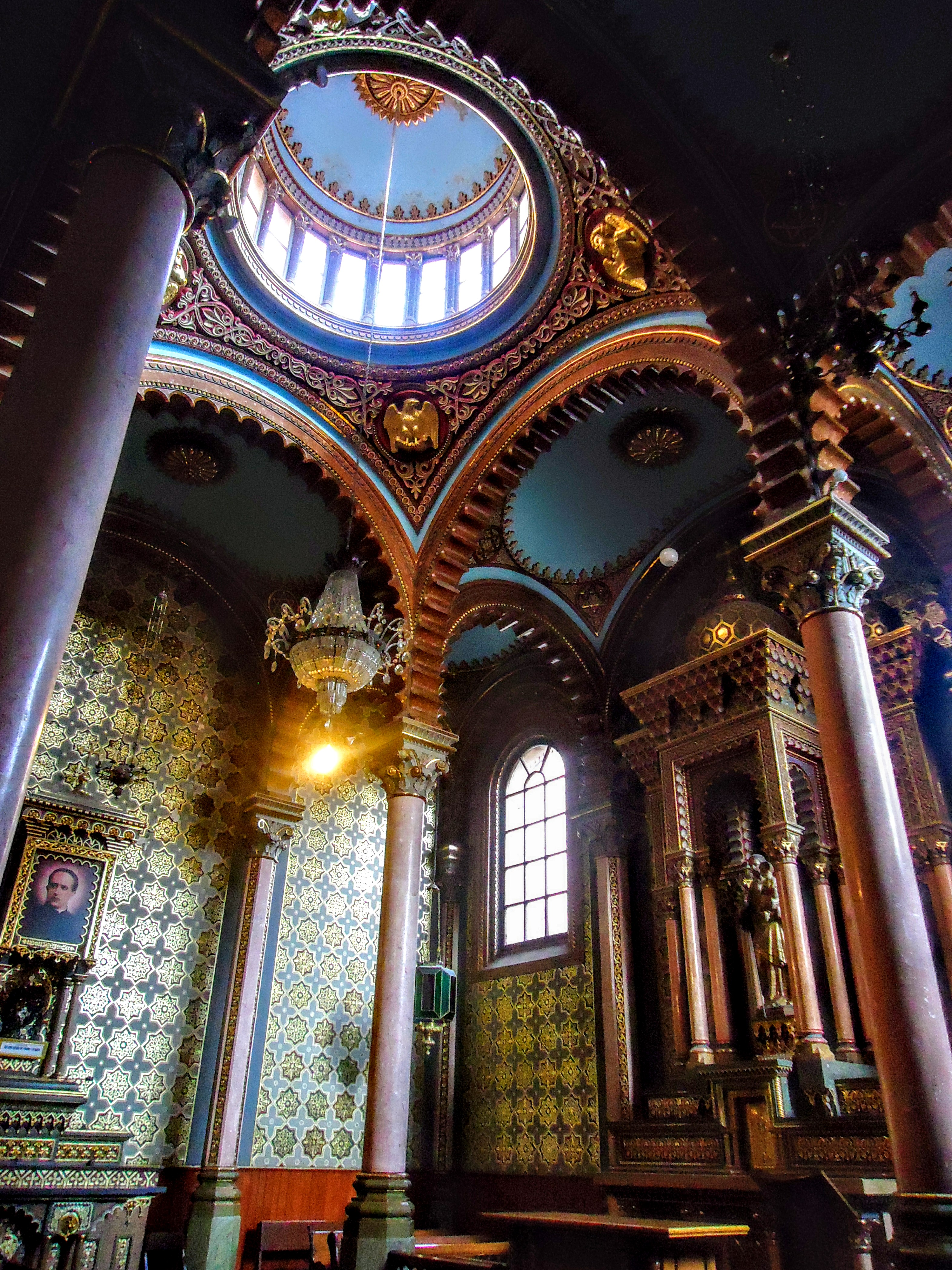 Capilla Catedral de León